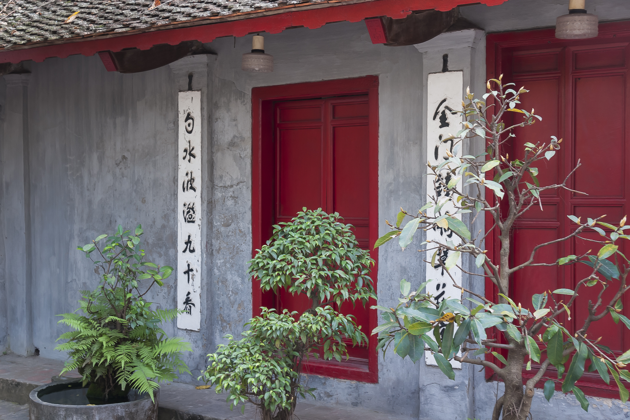 Hanoi, Vietnam: Inside the compound of Temple of the Jade Mountain